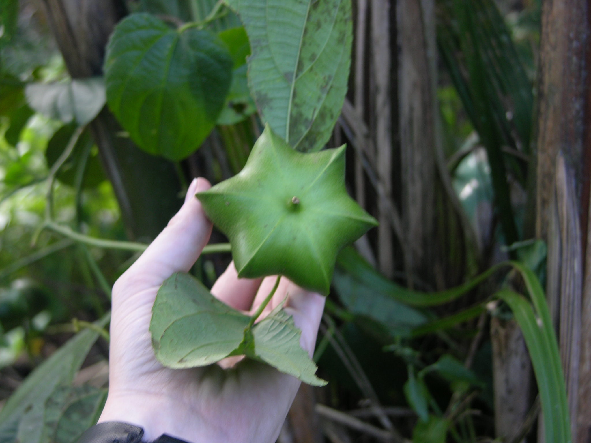 Fruit of Plukenetia volubilis